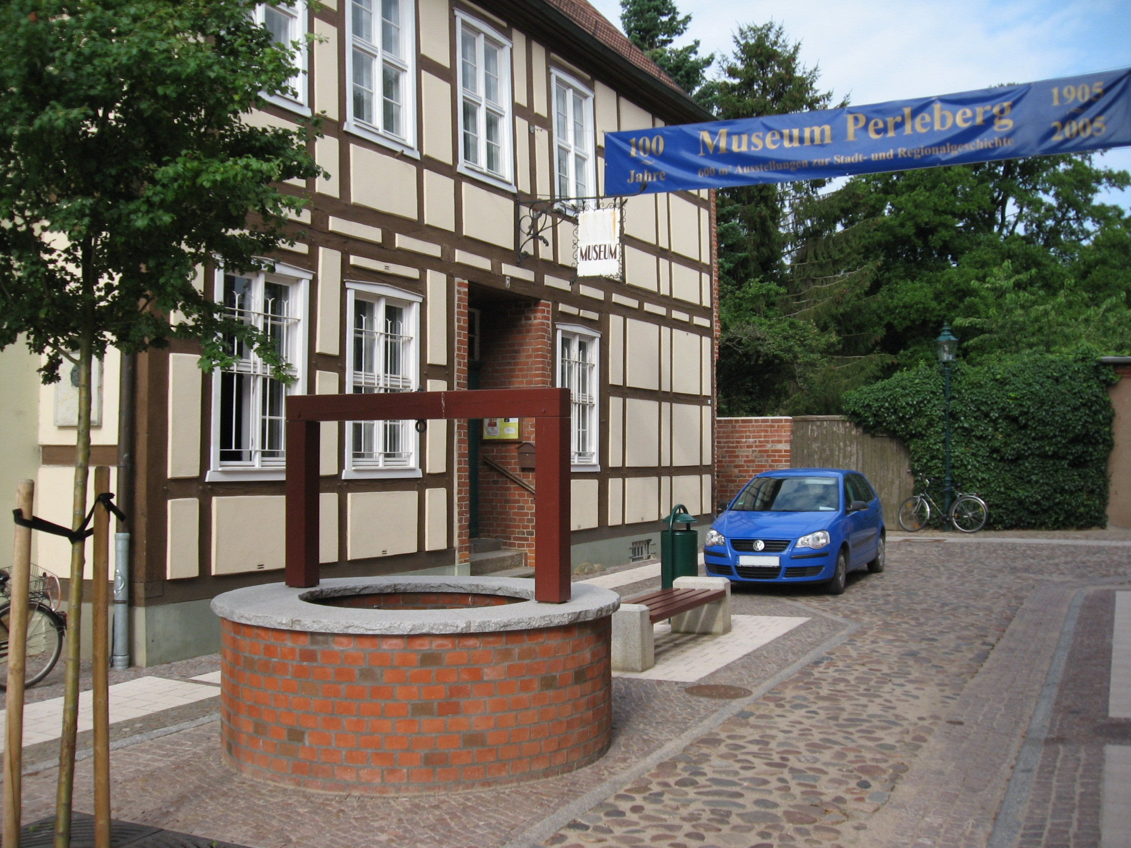 Eingang zum Perleberger Heimatmuseum